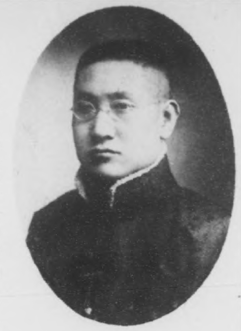 光緒甲辰科進士小像